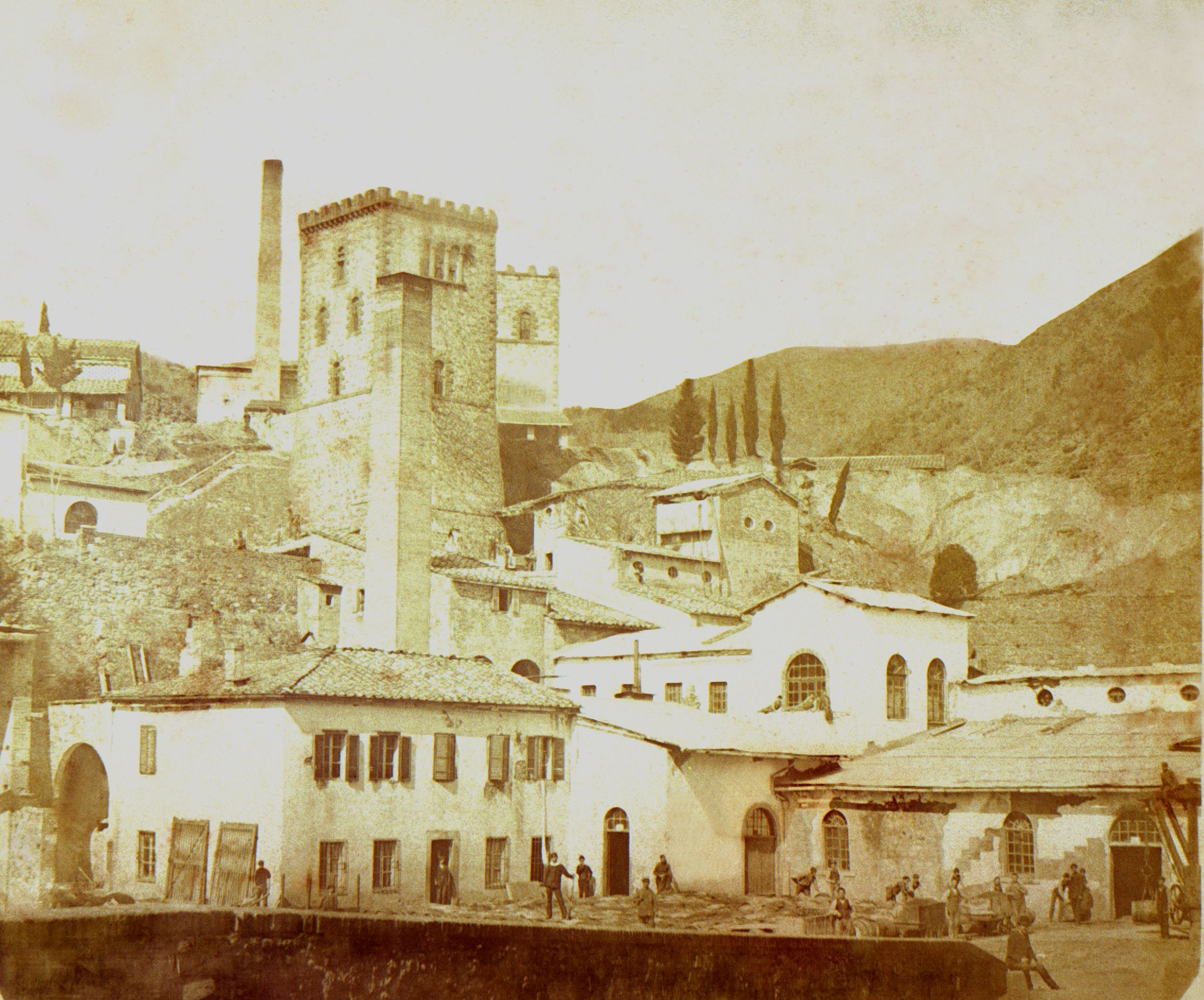 L'ingresso della miniera di Caporciano alla fine del XIX secolo.